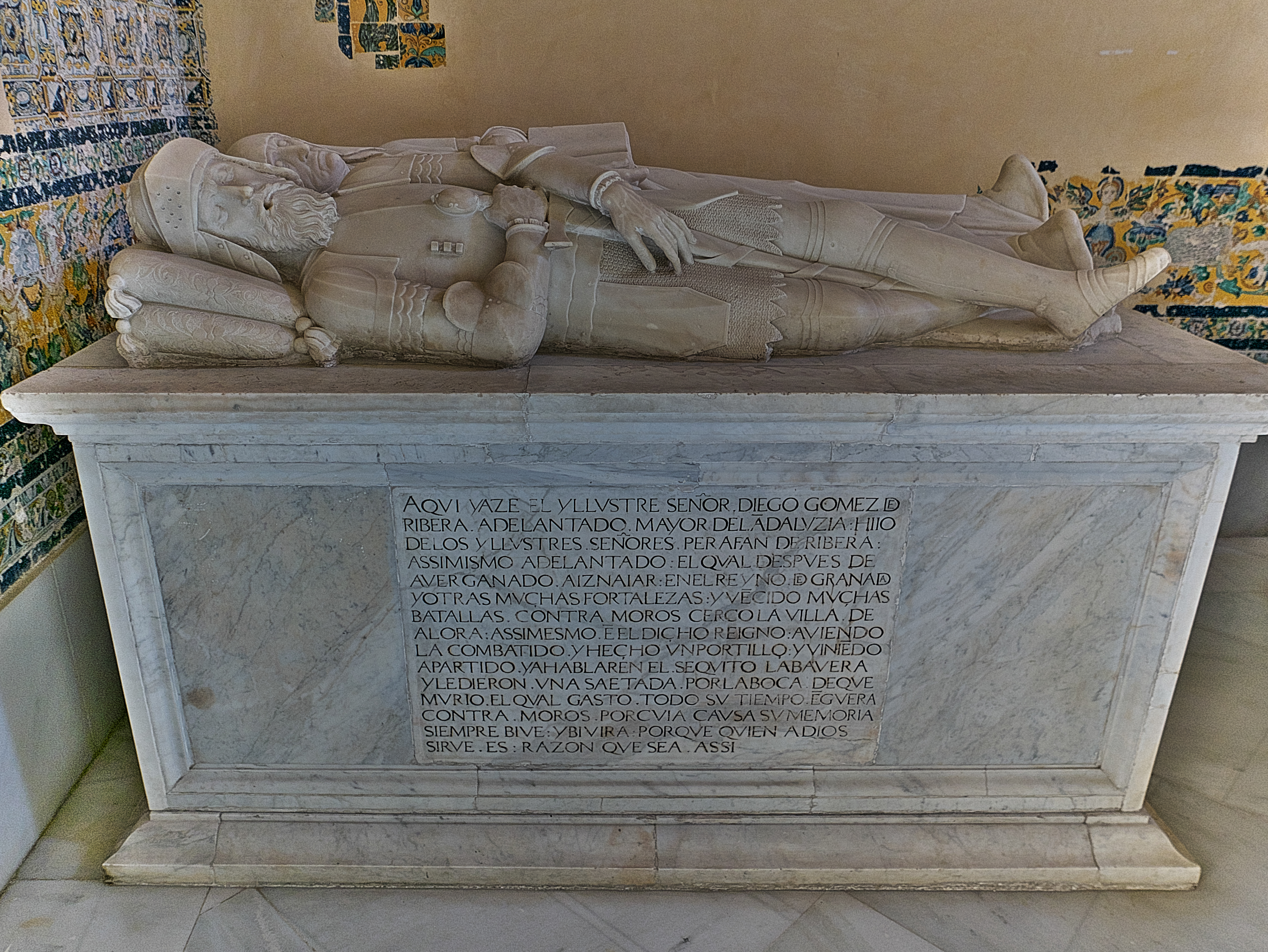 Capilla del Capítulo de la Cartuja de Sevilla. Sepulcro de mármol de Diego Gómez de Ribera y su esposa Beatriz Portocarrero.